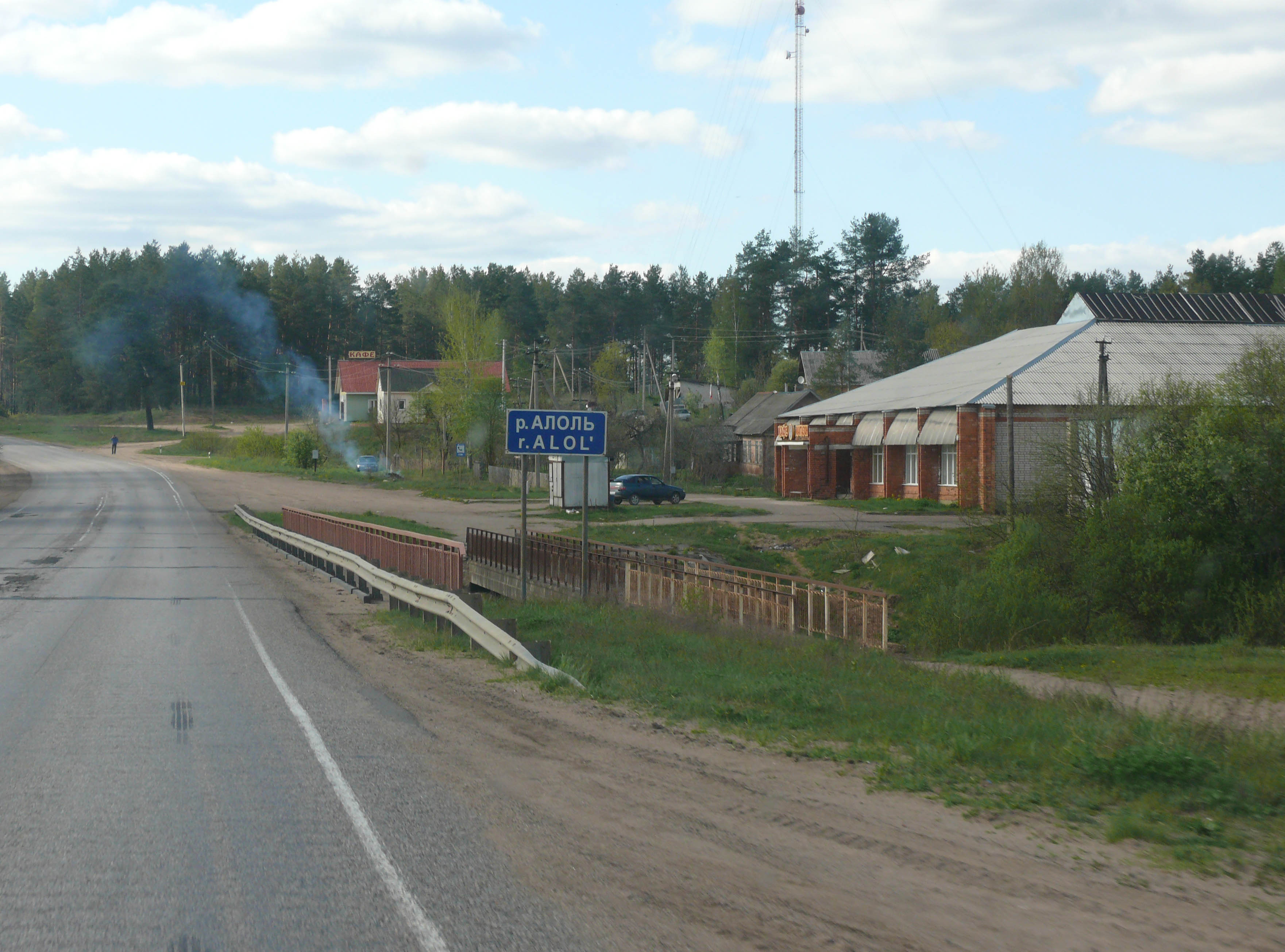 Мост через реку Алоль на участке автодороги Е-95 Пустошь - Опочка